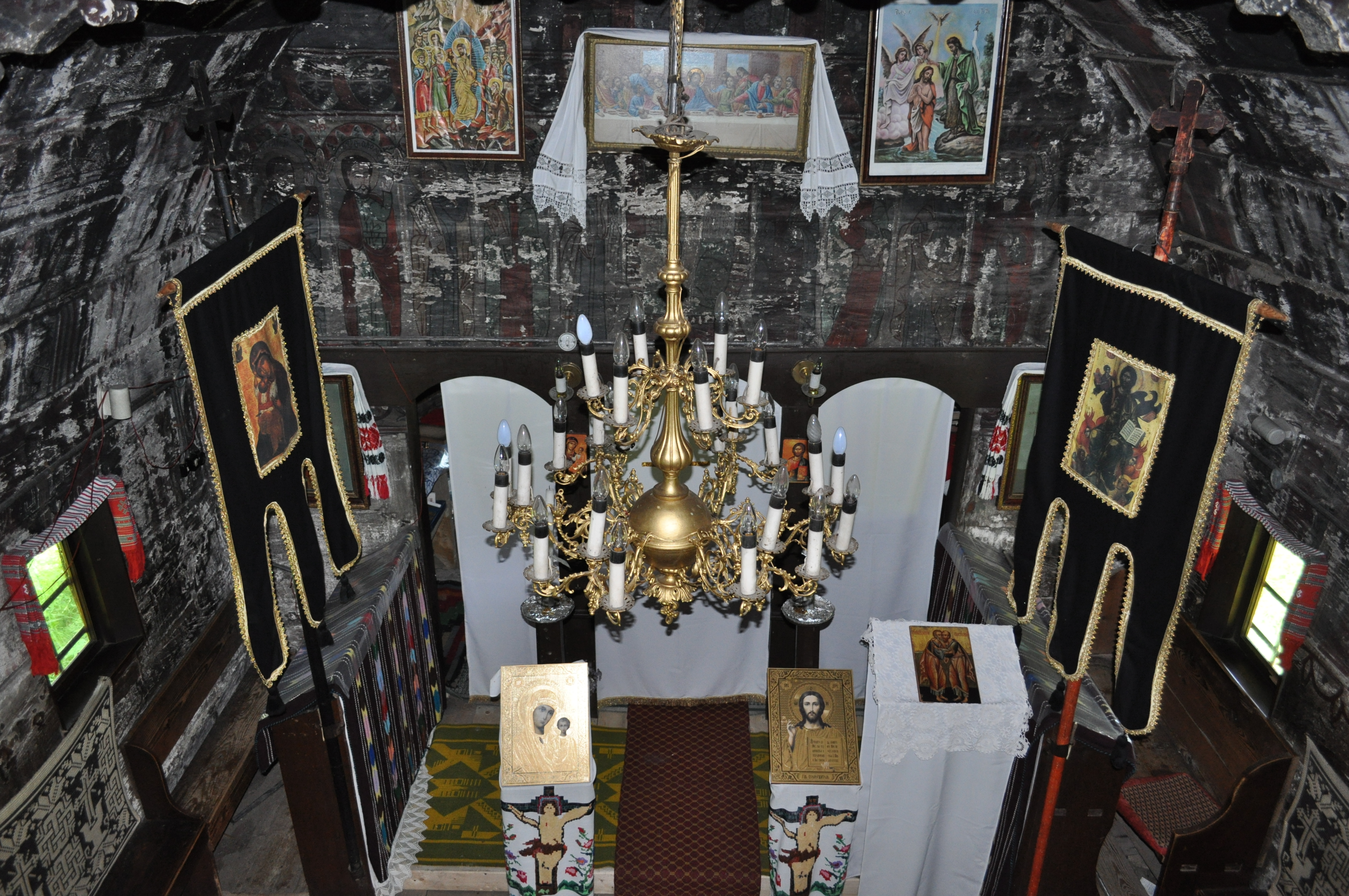 Biserica de lemn din Ticu-sat, județul Cluj